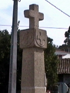 O capitel do Cruzeiro